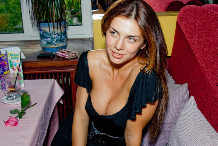 Anna Sedokova is a Ukrainian pop singer